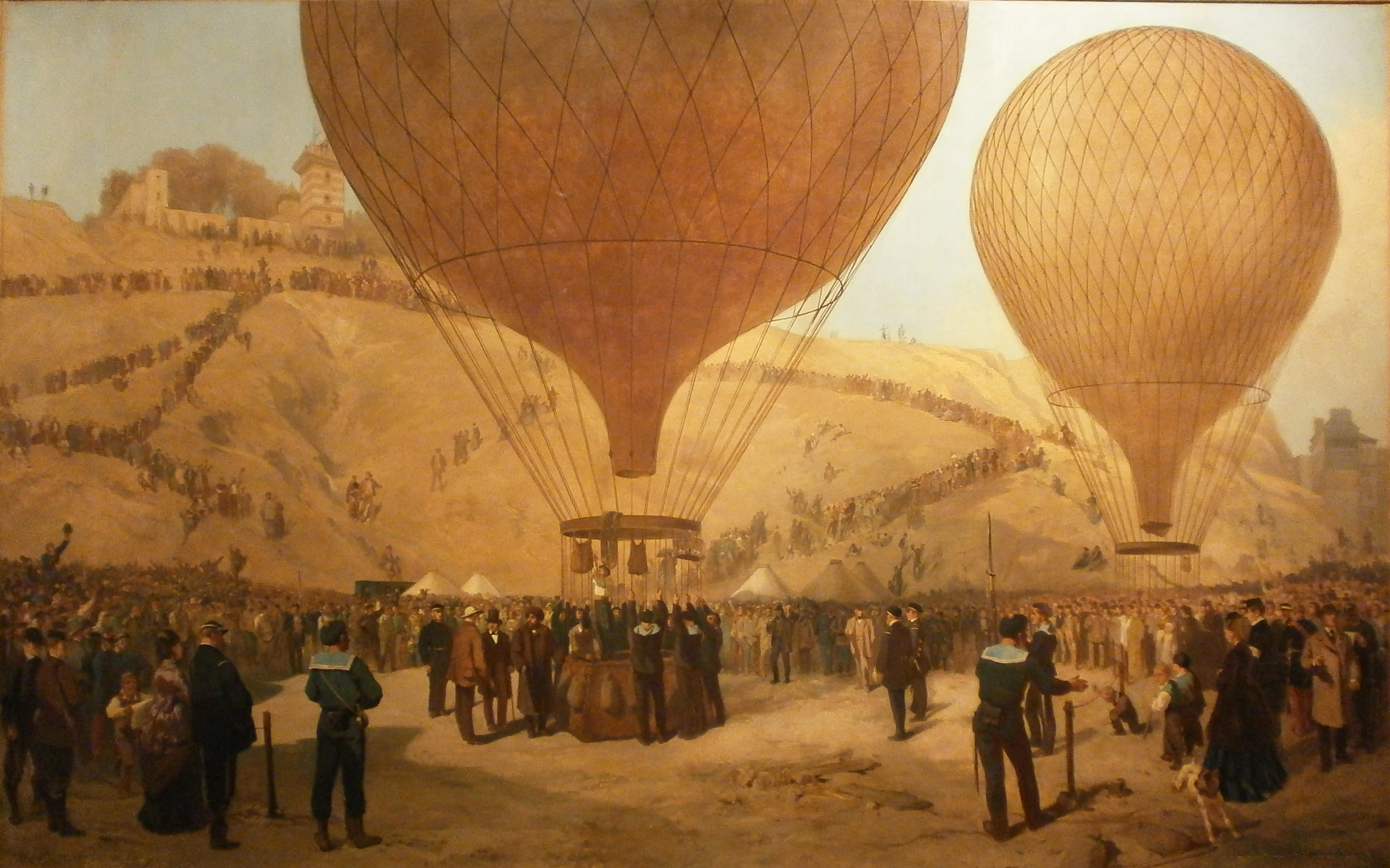 Départ de Gambetta sur le ballon l'"Armand-Barbès" le 7 octobre 1870title QS:P1476,fr:"Départ de Gambetta sur le ballon l'"Armand-Barbès" le 7 octobre 1870" label QS:Lfr,"Départ de Gambetta sur le ballon l'"Armand-Barbès" le 7 octobre 1870"